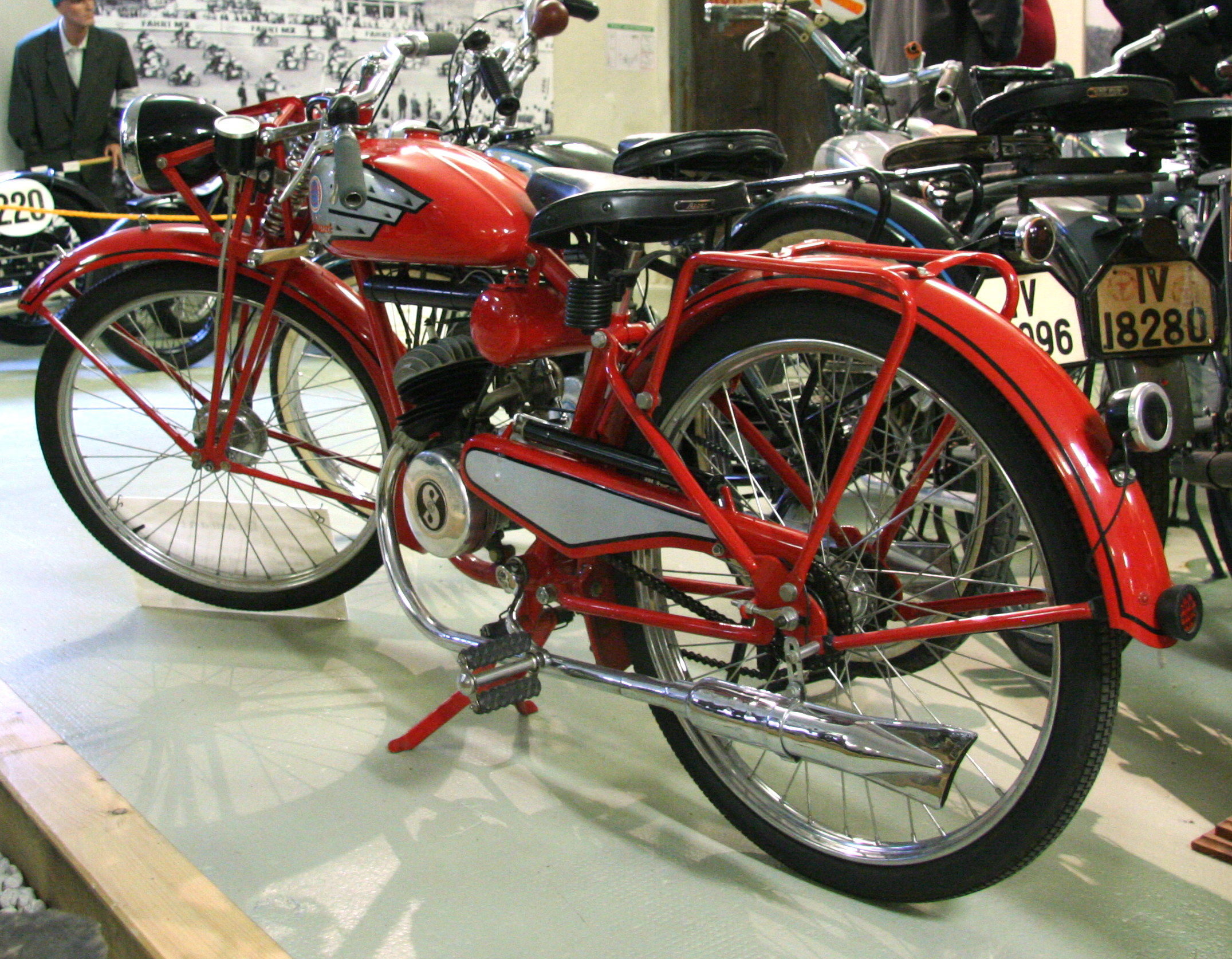 Diamant Modell 36 mit einem Fichtel & Sachs Motor, 98 cm³, Hersteller: Elite-Diamant AG Siegmar, im Museum für sächsische Fahrzeuge in Chemnitz.